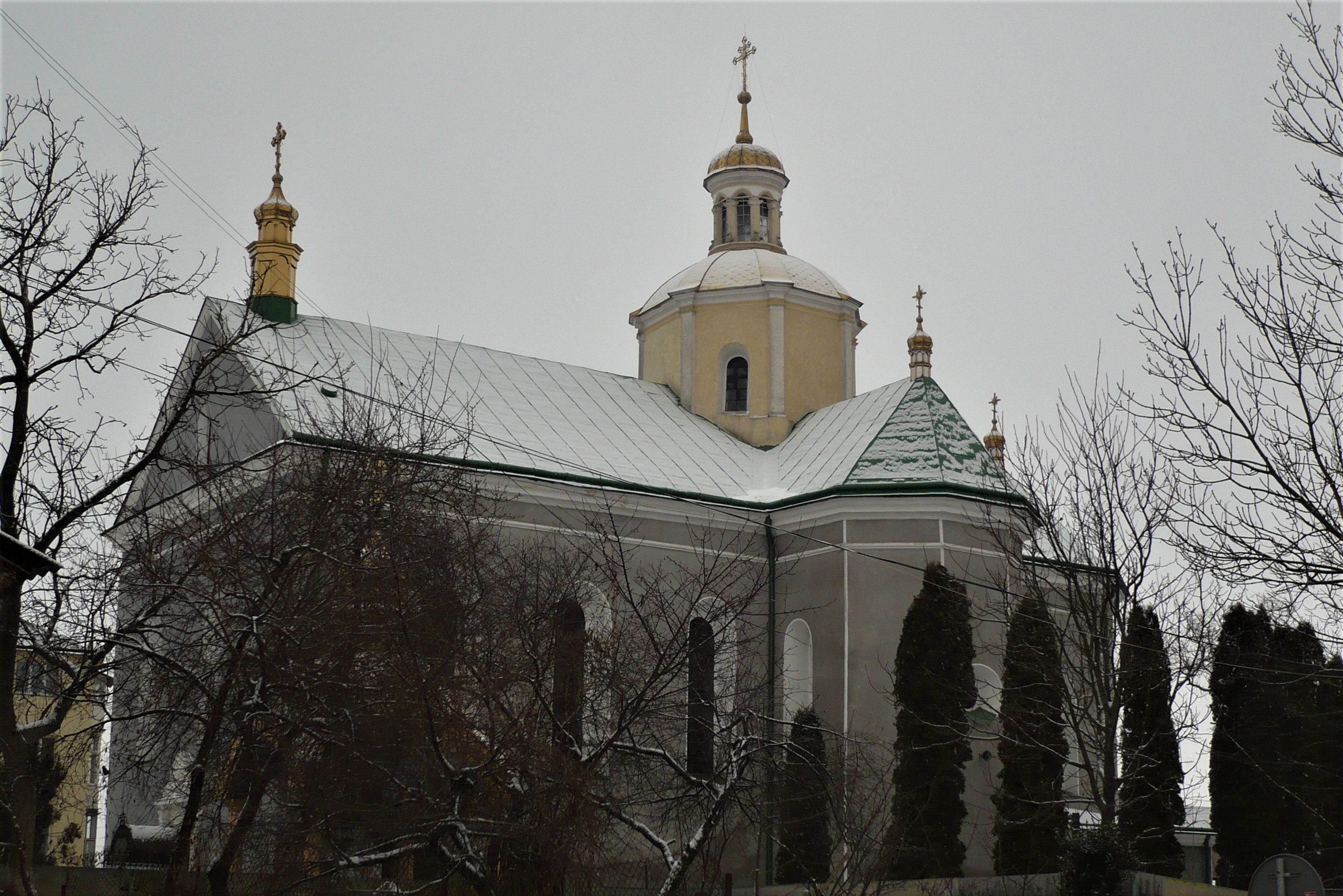 Kosciół